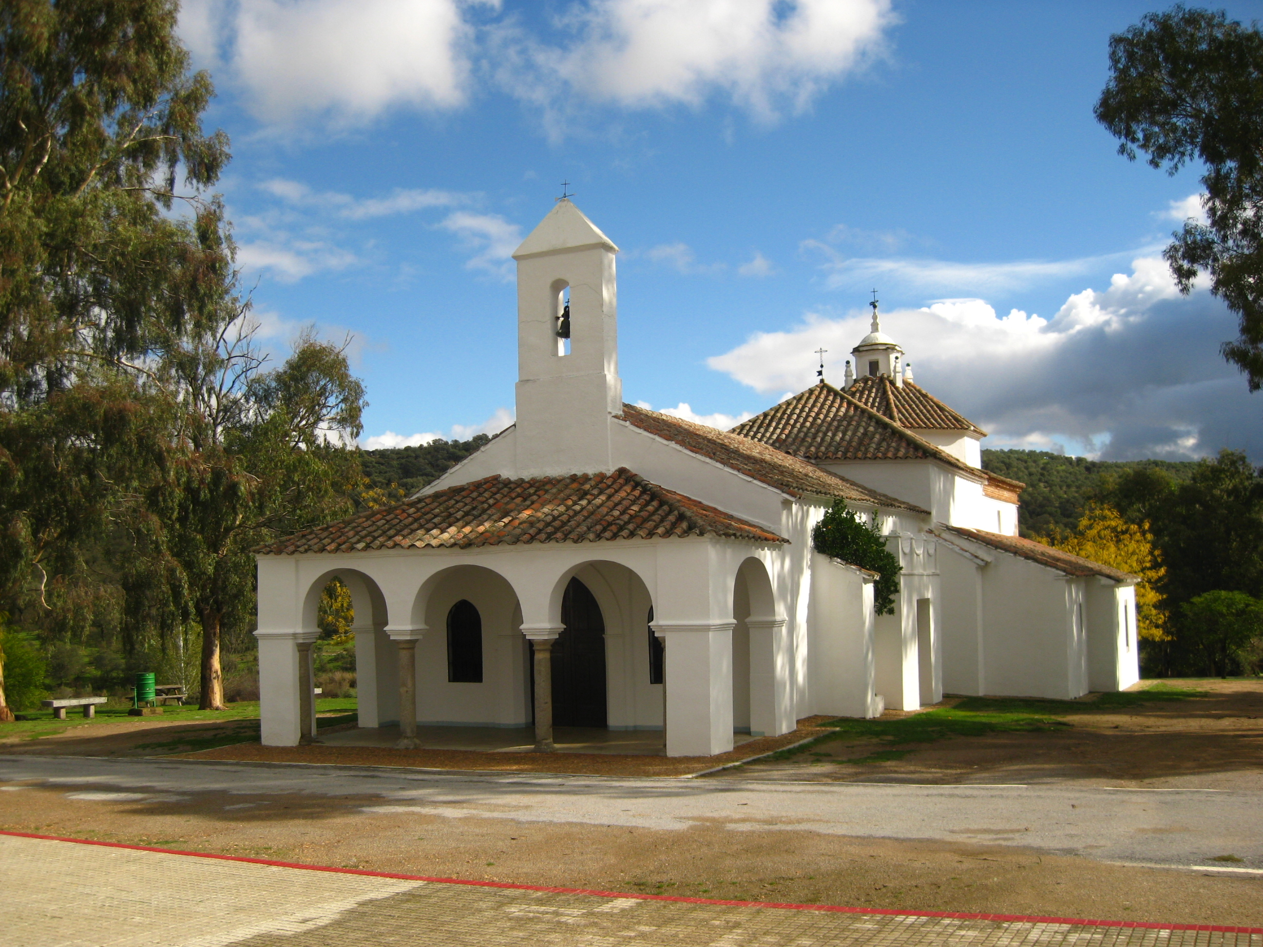 Ermita Virgen de Veredas. Torrecampo